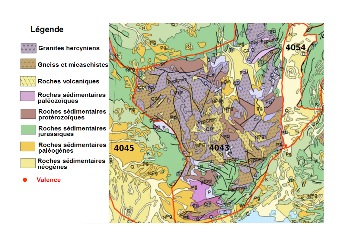 Carte géologique de Valence (Drôme)